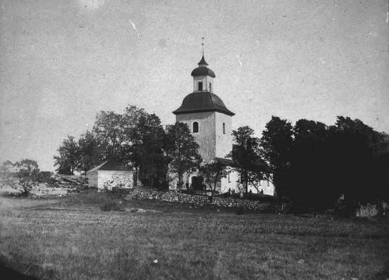 Kyrkan mot nordöst. Kopia av äldre foto.